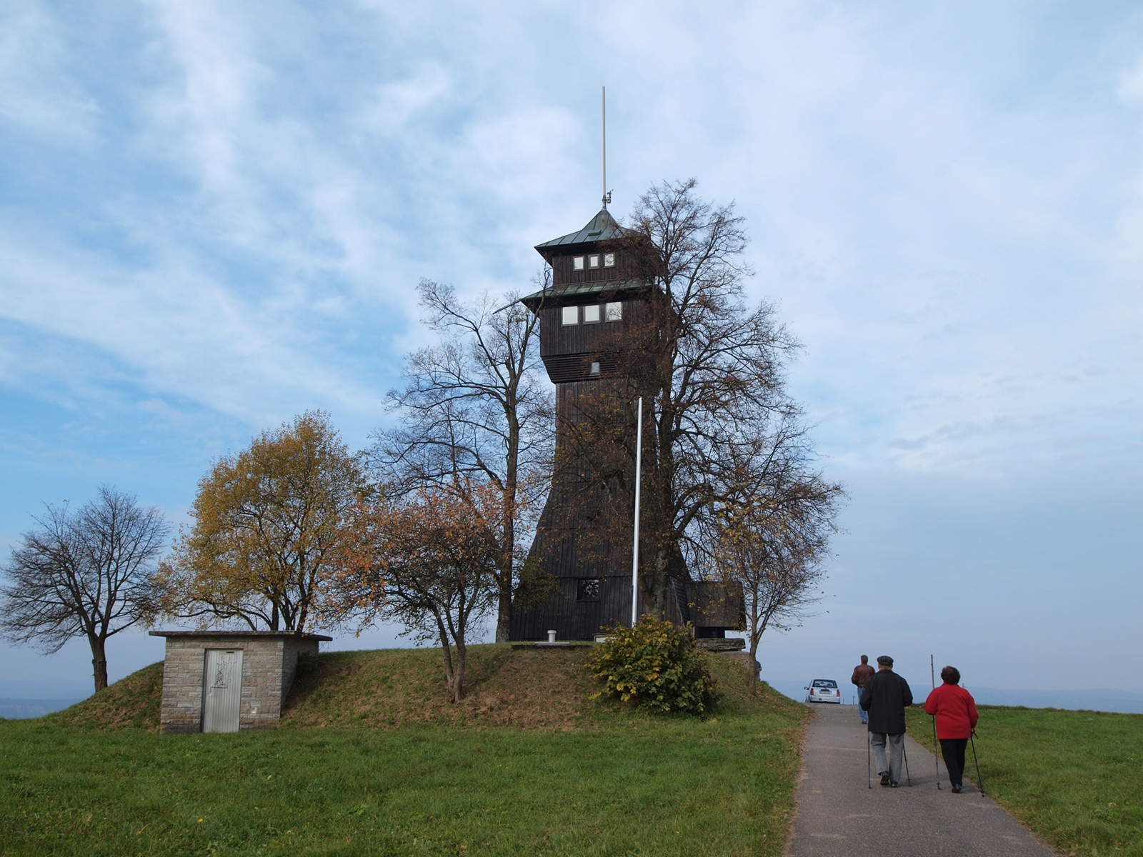 Hagbergturm view tower near Gschwend, Germany